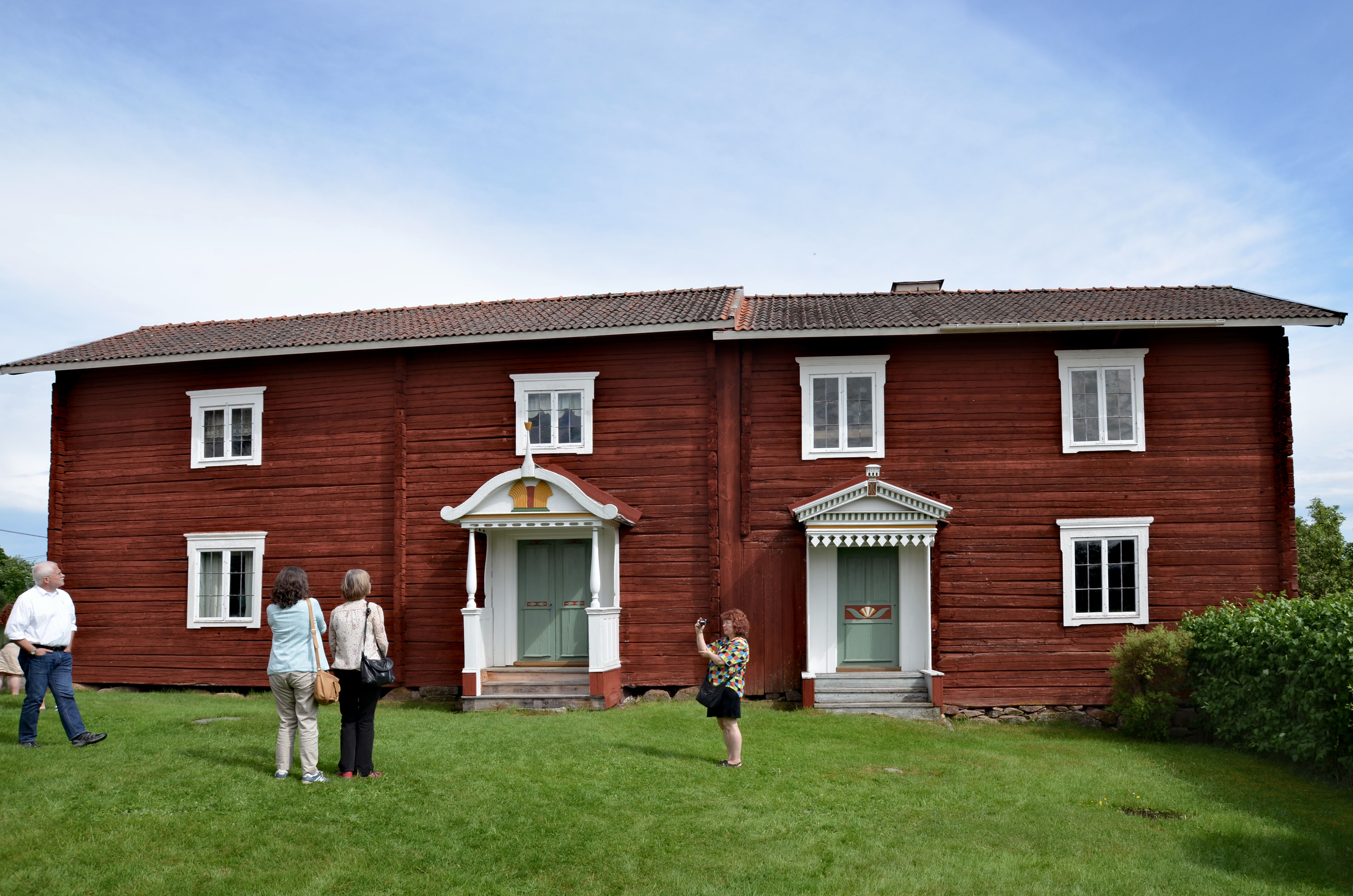 Östra flygelbyggnaden till Hälsingegården Pallars i Långhed. Väggmålningar av "Blåmålaren" i sängstugan.